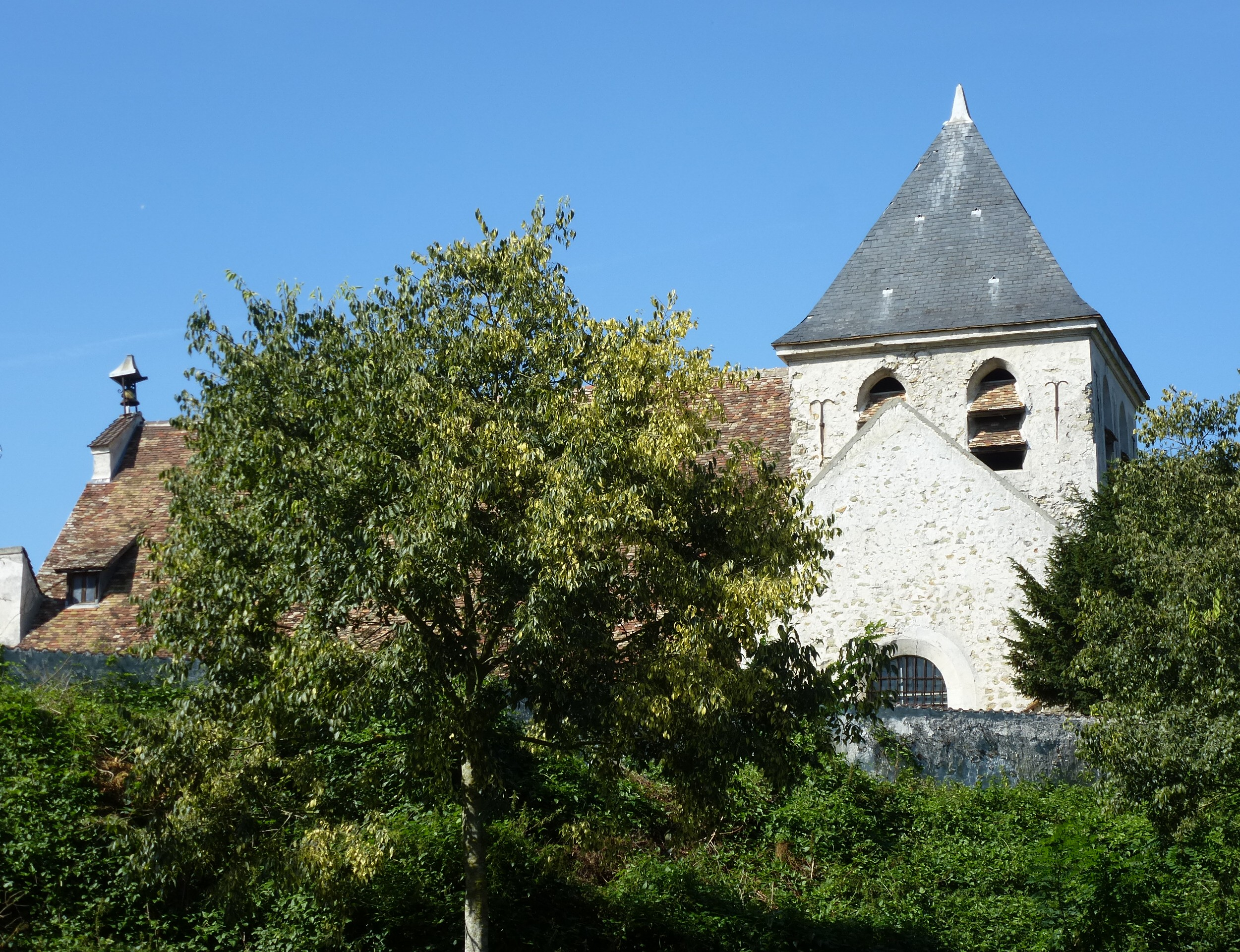 Église de la Sainte-Trinité de Charmentray. (Seine-et-Marne, région Île-de-France).